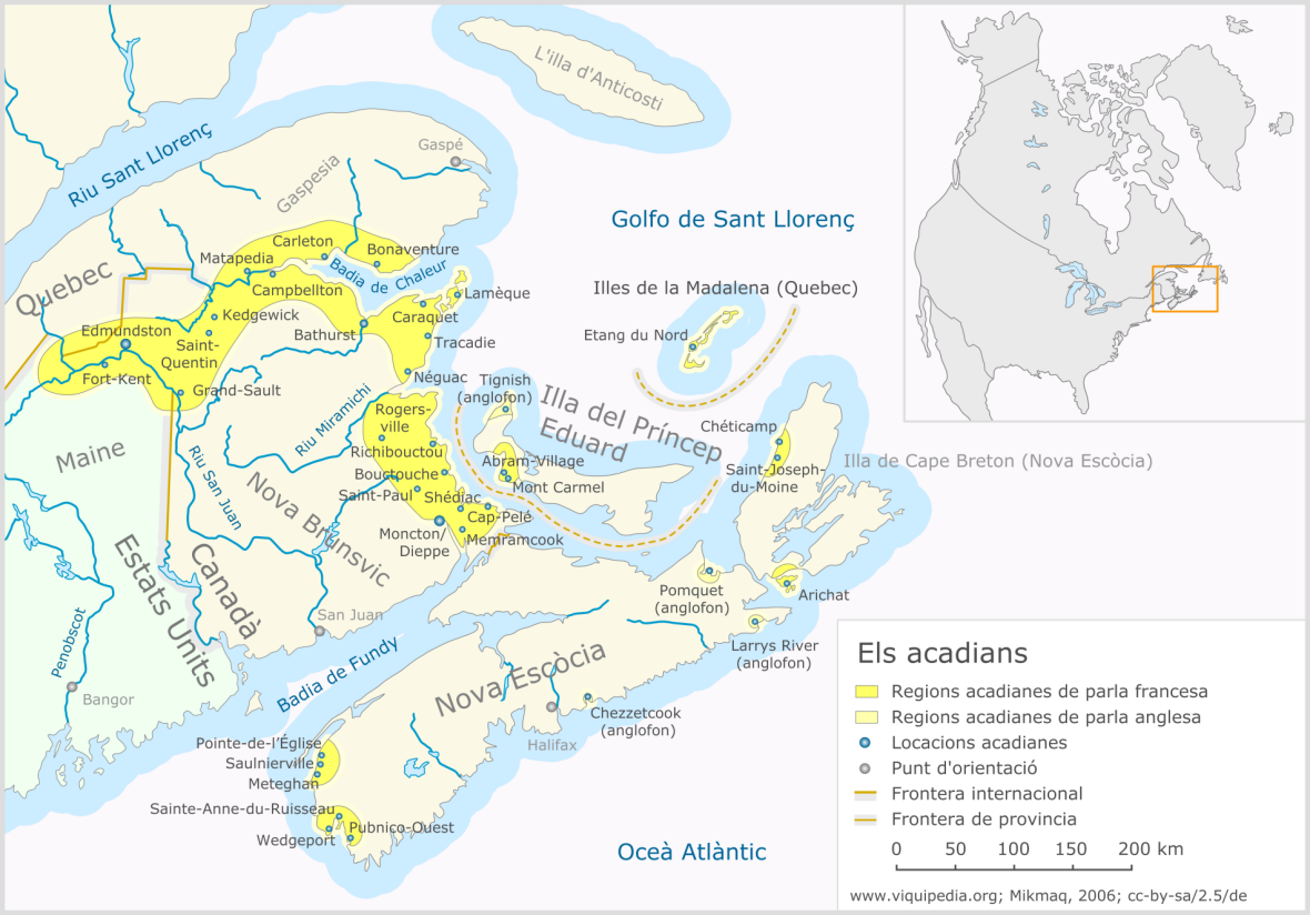 Regions acadianes